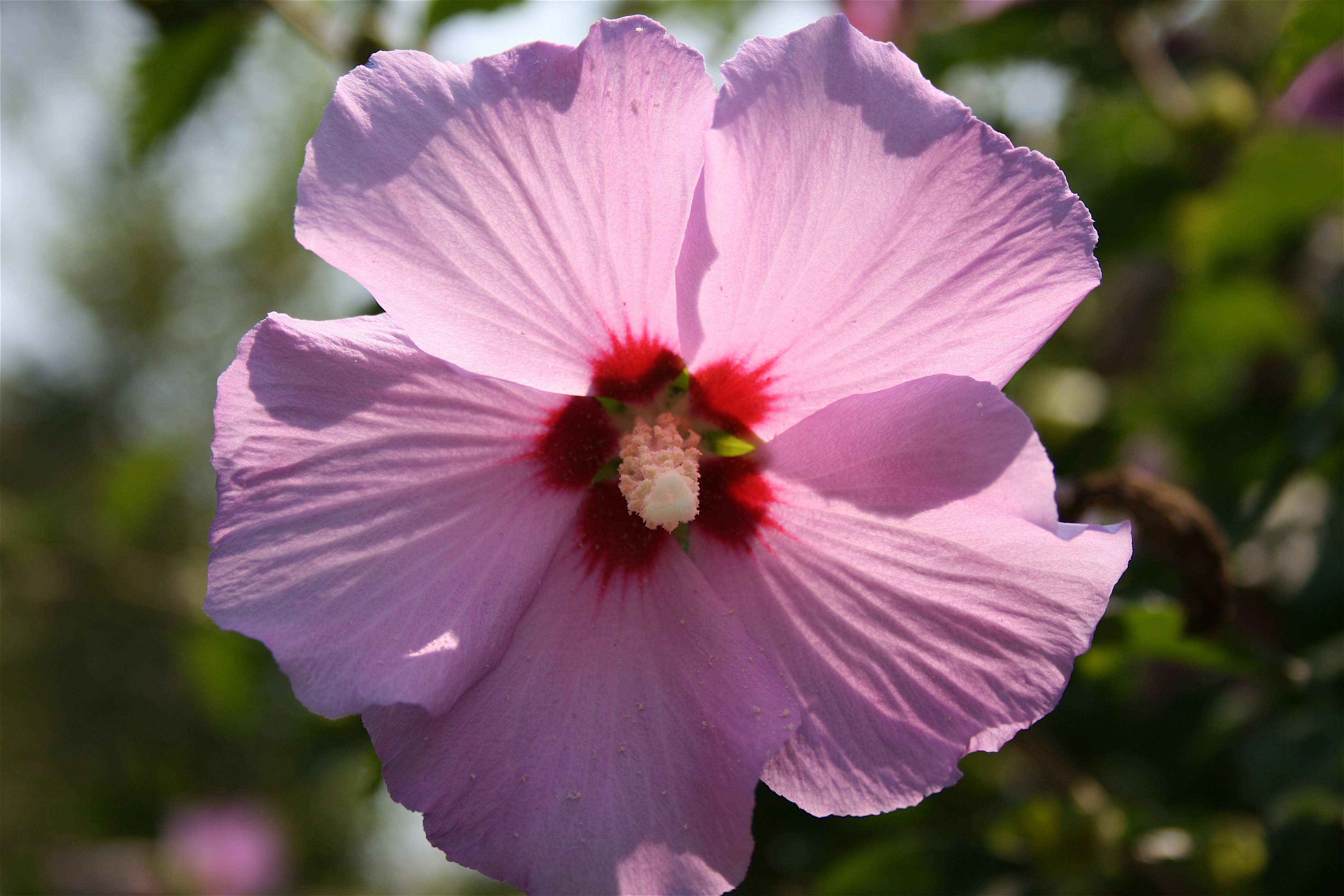 Hibiscus (Hibiscus syriacus) in a Portage, MI garden.